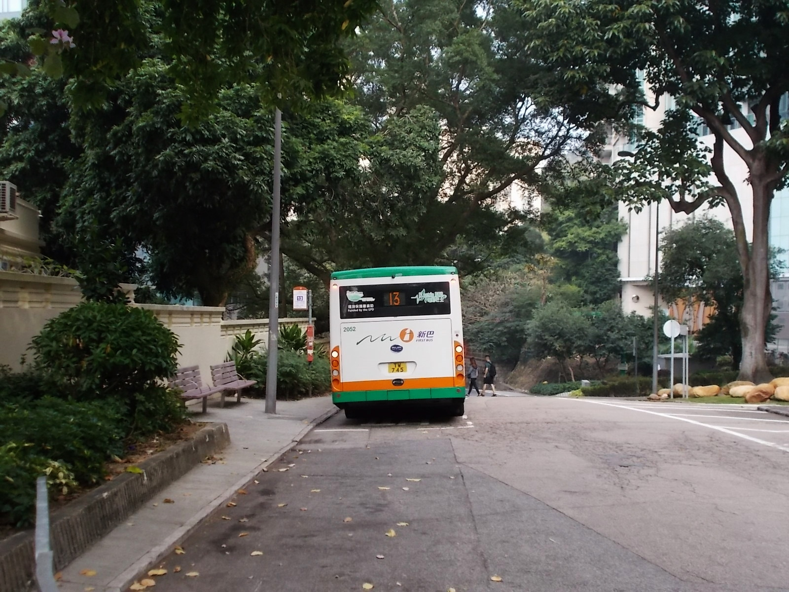 旭龢道巴士總站(2019年12月)